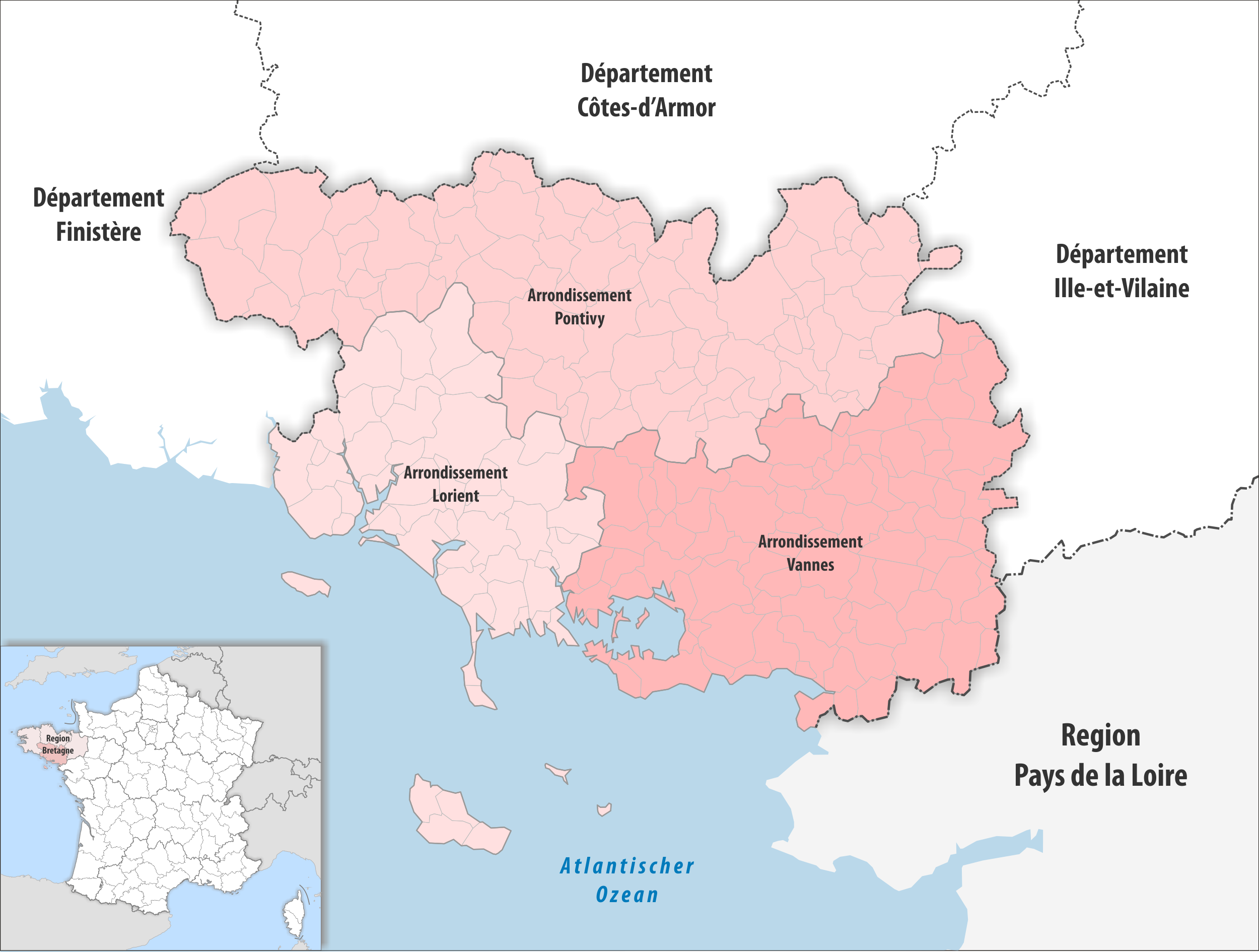 Gemeinden und Arrondissemente im Departement Ille-et-Vilaine